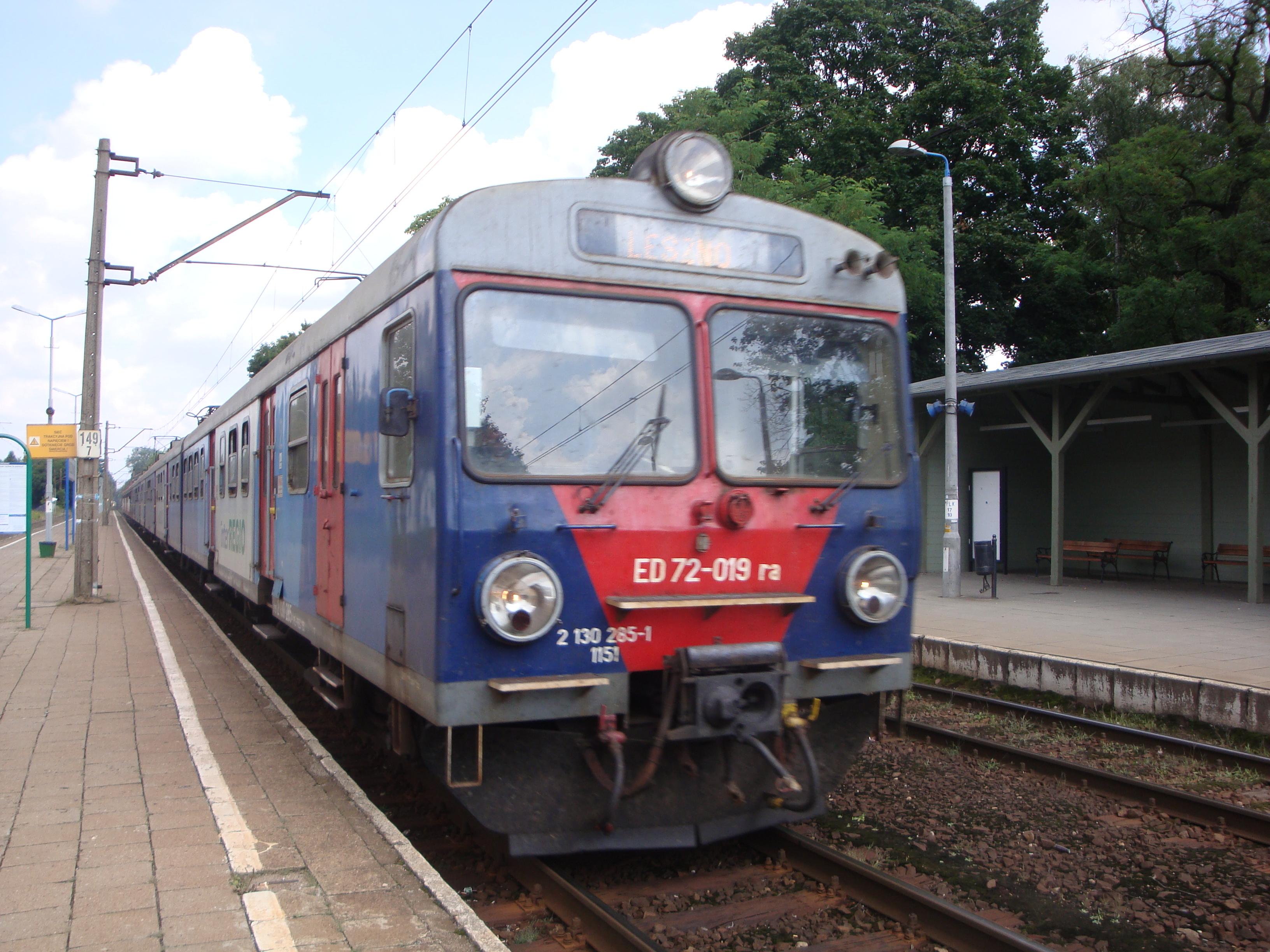 Elektryczny Zespół Trakcyjny ED72-019 w Puszczykówku. This photo was taken during Railway Wikiexpedition 2013 set up by Wikimedia Polska Association. You can see all photographs in category Wikiekspedycja kolejowa 2013. English | Polski | +/−